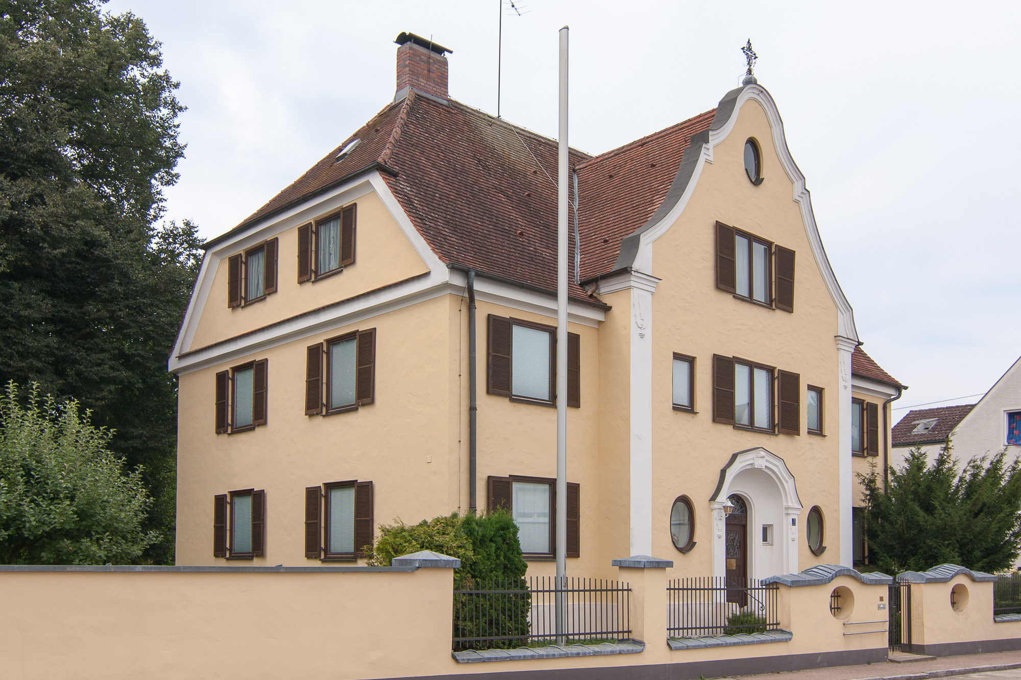 Pfarrhaus; stattlicher Bau mit Halbwalm und Zwerchgiebel, neubarock, 1913.This is a photograph of an architectural monument.